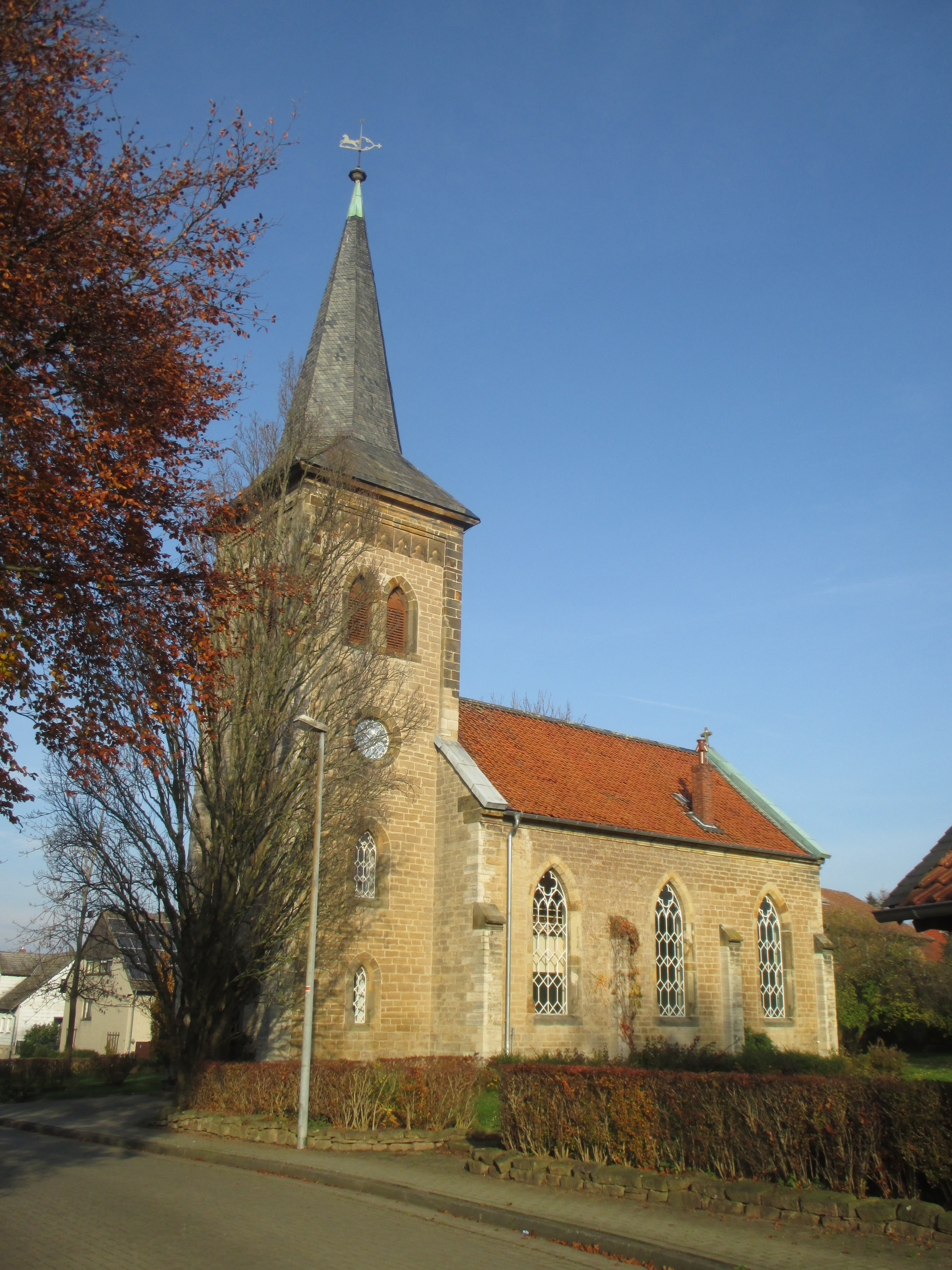 evangelische Kirche in Westerlinde, Gemeinde Burgdorf, Landkreis Wolfenbüttel